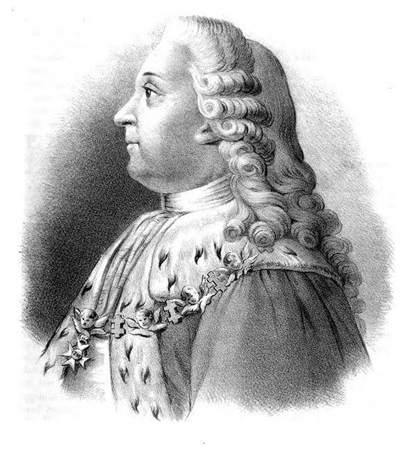 Carl Fredrik Scheffer (1715-1786)